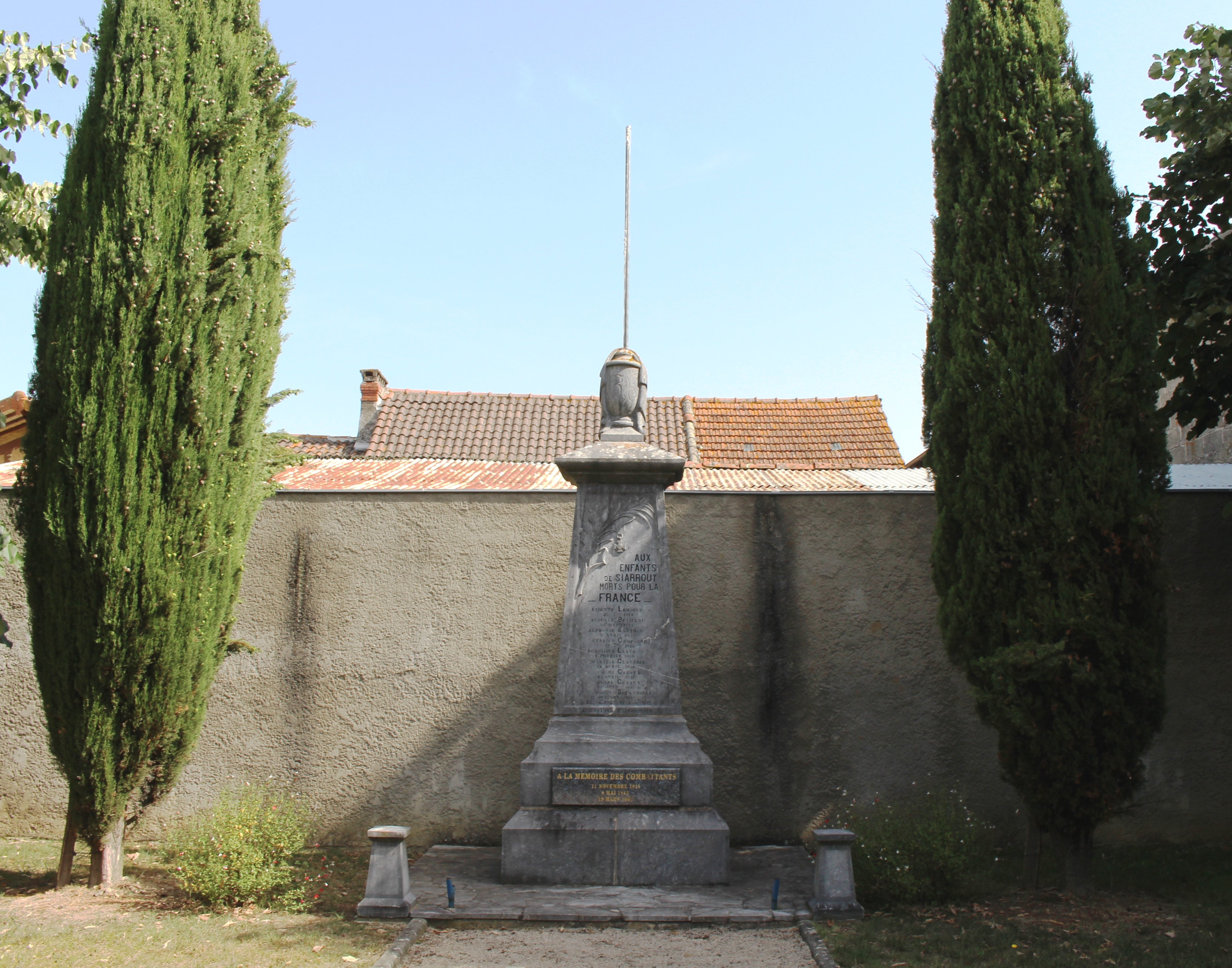 Monument aux morts de Siarrouy (Hautes-Pyrénées)